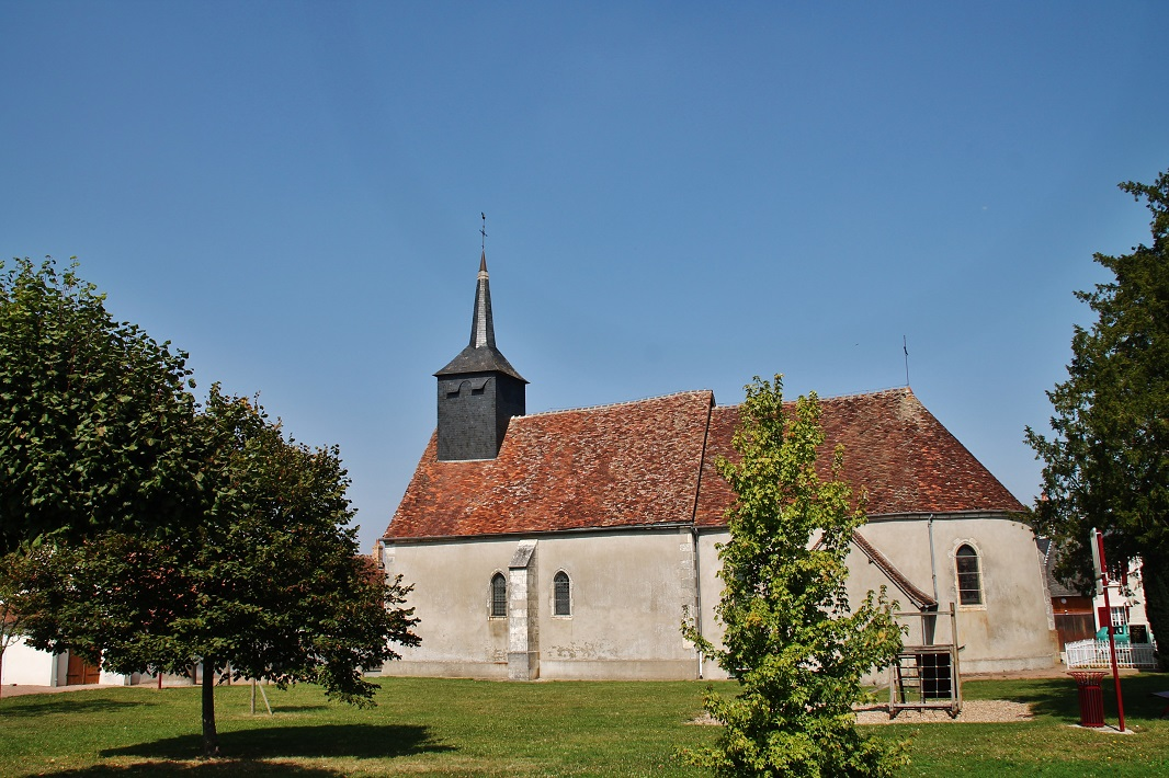 église St Fiacre